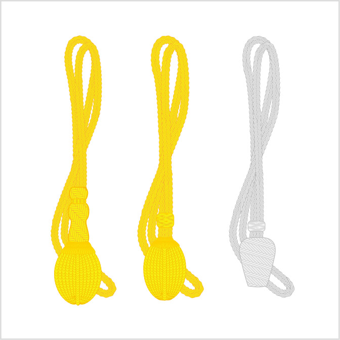 臺灣總督府文官劍緒Redraw Government-General of Taiwan Gazette.